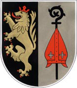 Wappen von Gondershausen